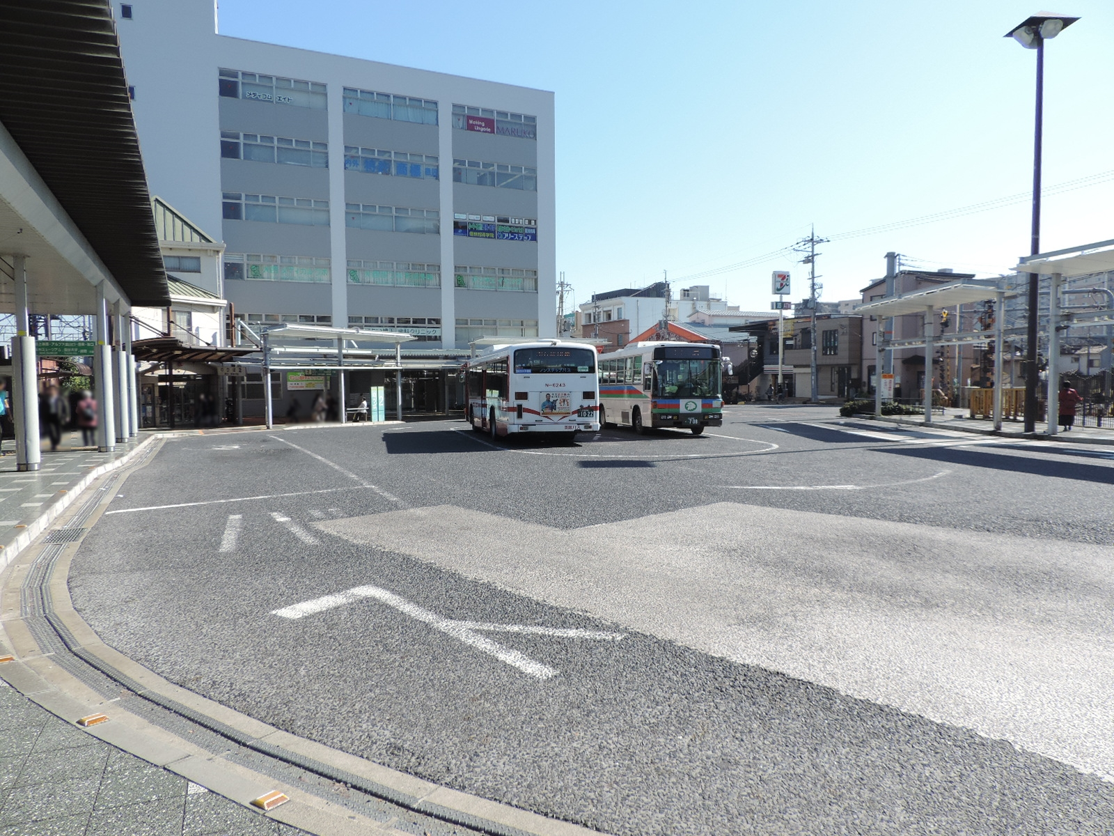 石山駅南口バスターミナル（2017年撮影）